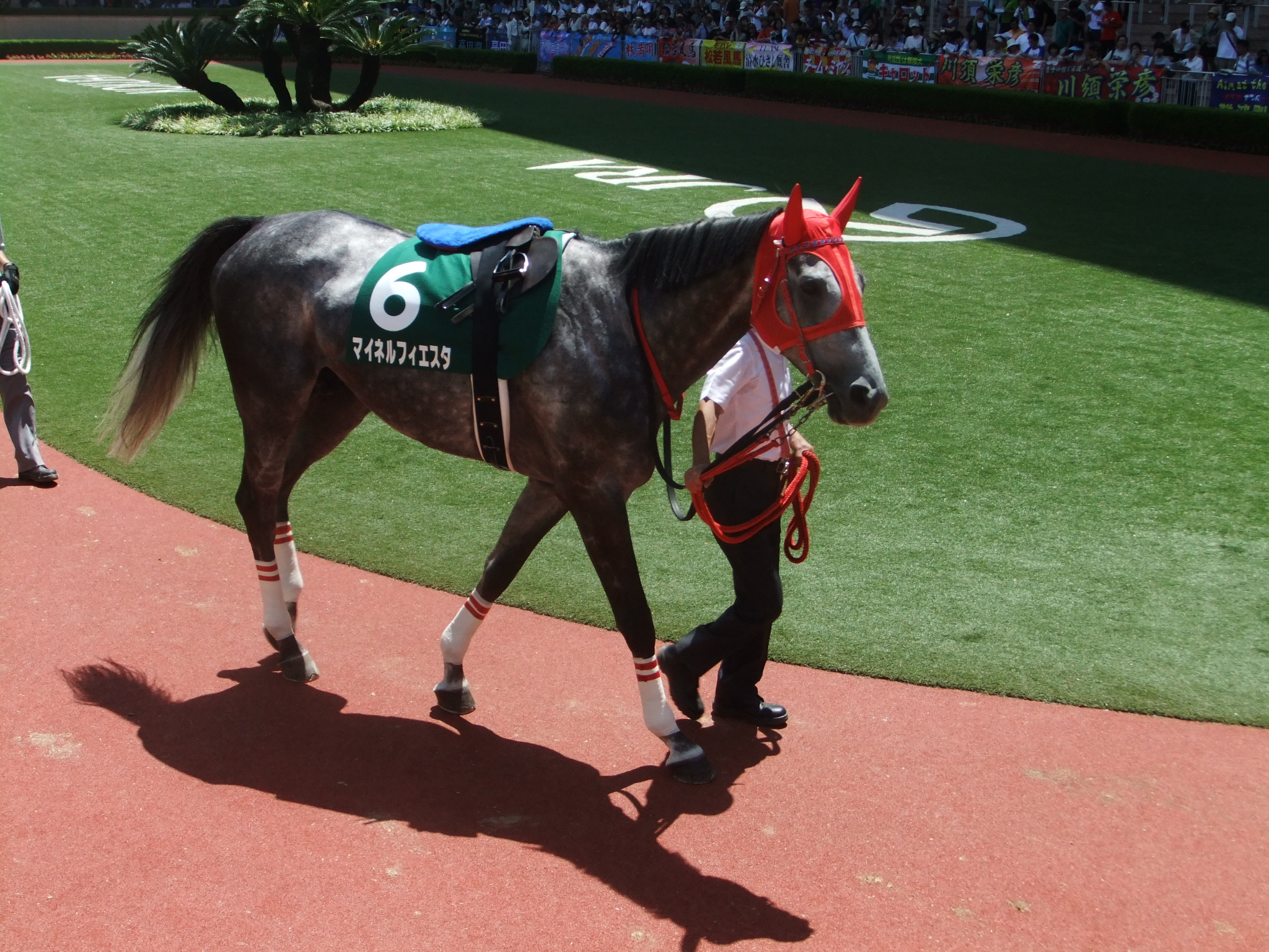 マイネルフィエスタ 2015年8月1日 小倉競馬場